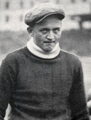 Rodolphe Hiden en avril 1939.